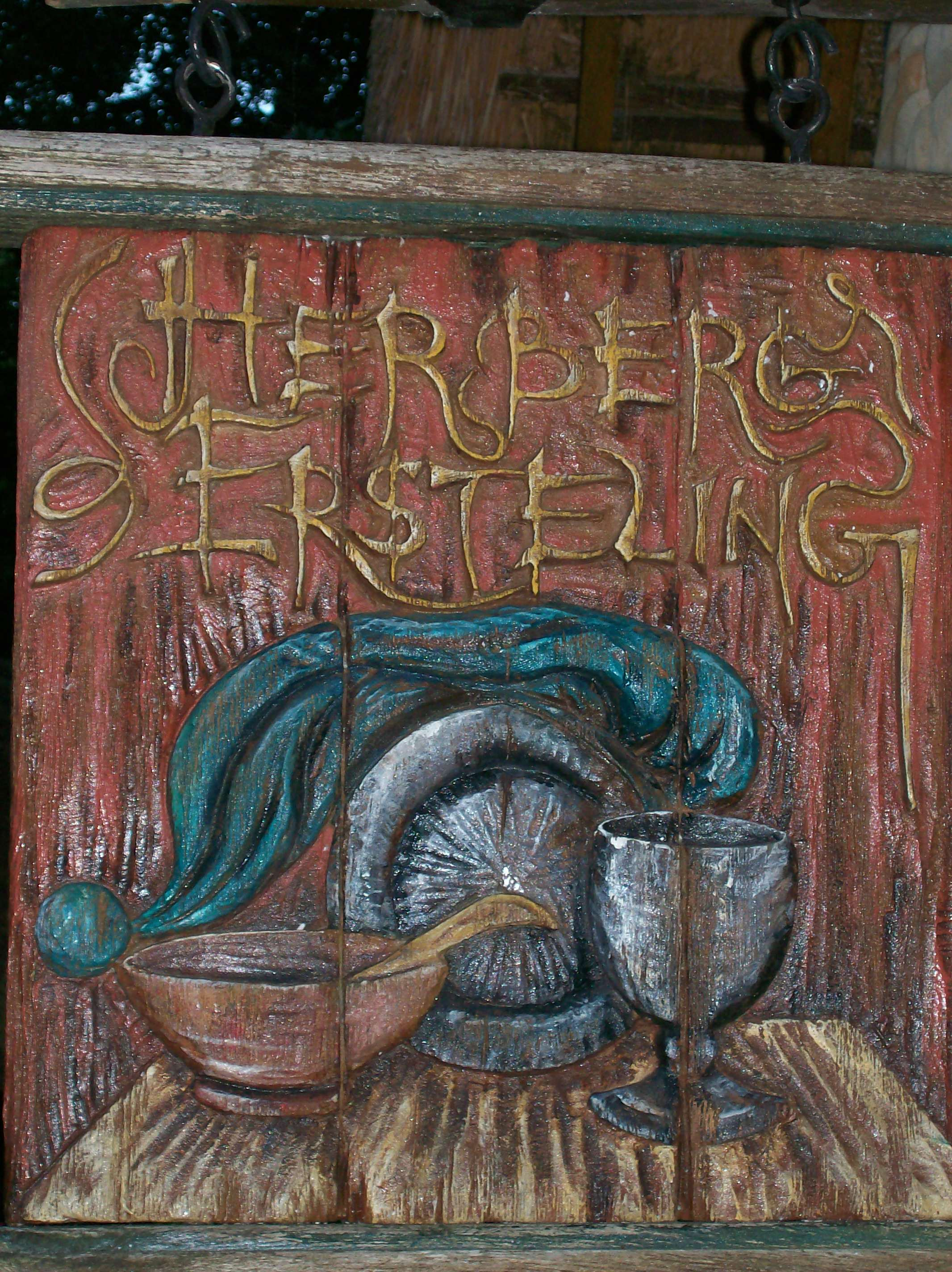 Enseigne de Herberg de Ersteling dans le bois des contes